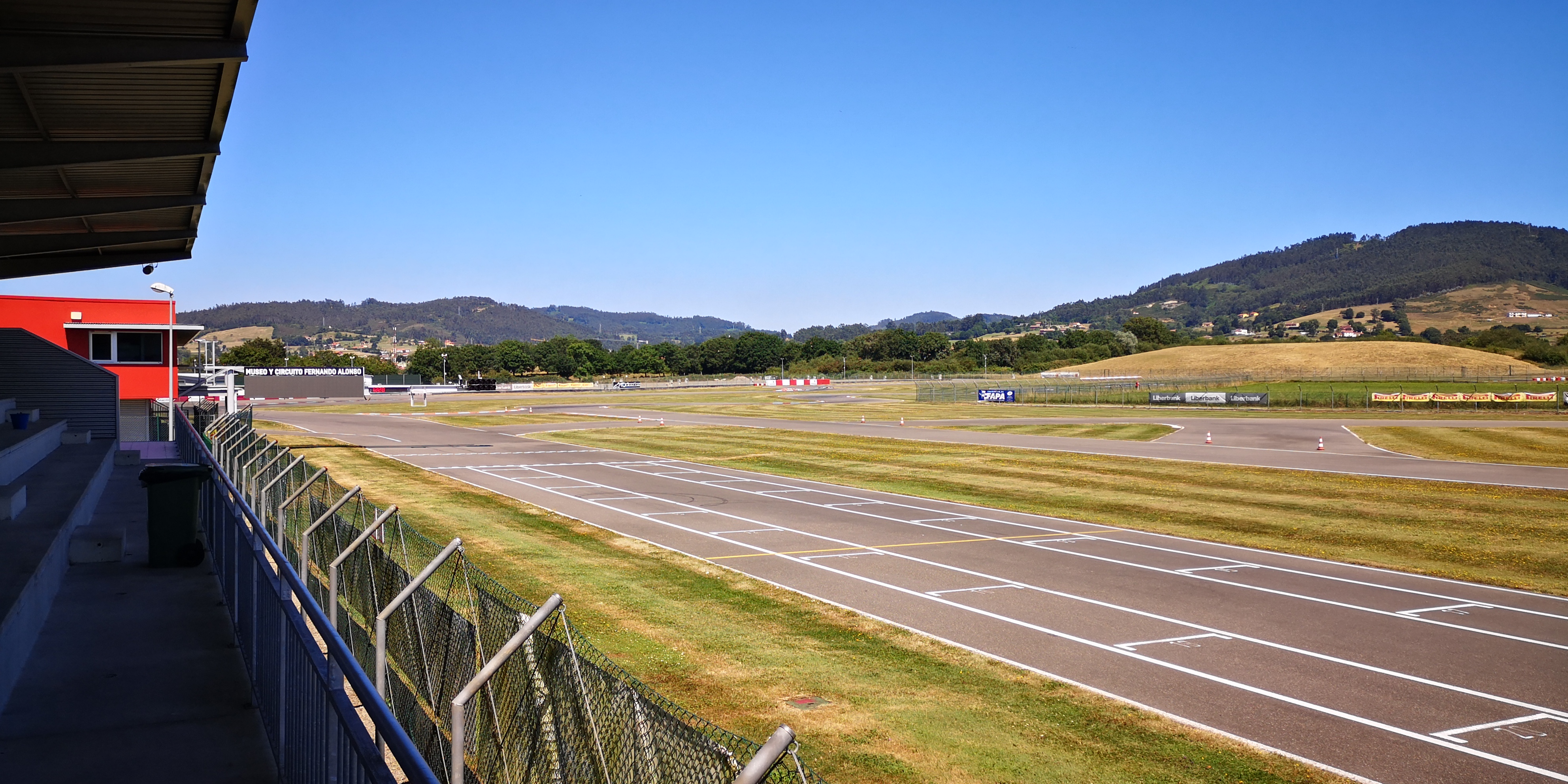 Circuito de karting en el Complejo Deportivo Fernando Alonso en Llanera (España)